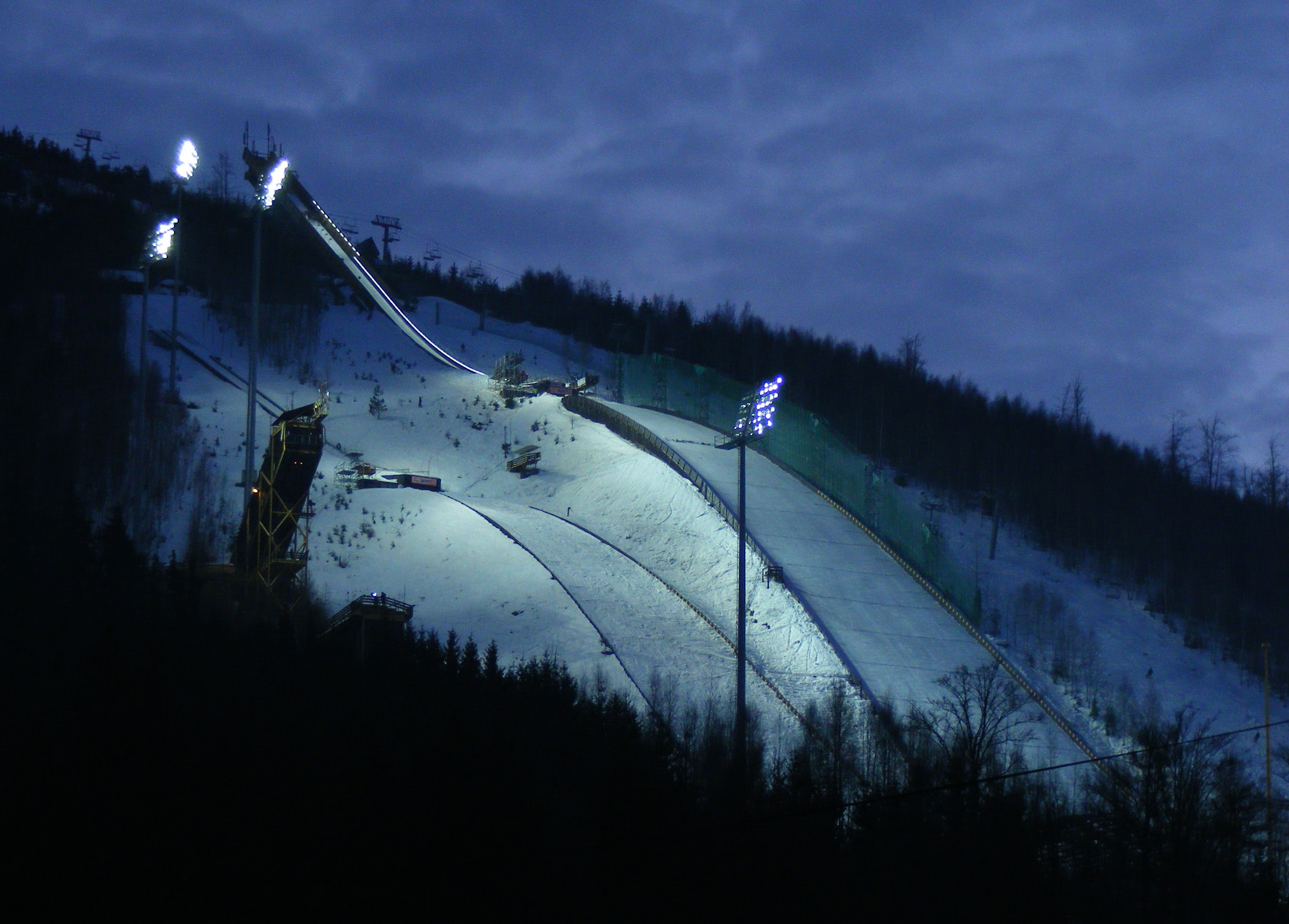 Skocznie Čerťák HS142 i Čerťák HS205 przy nocnym oświetleniu.